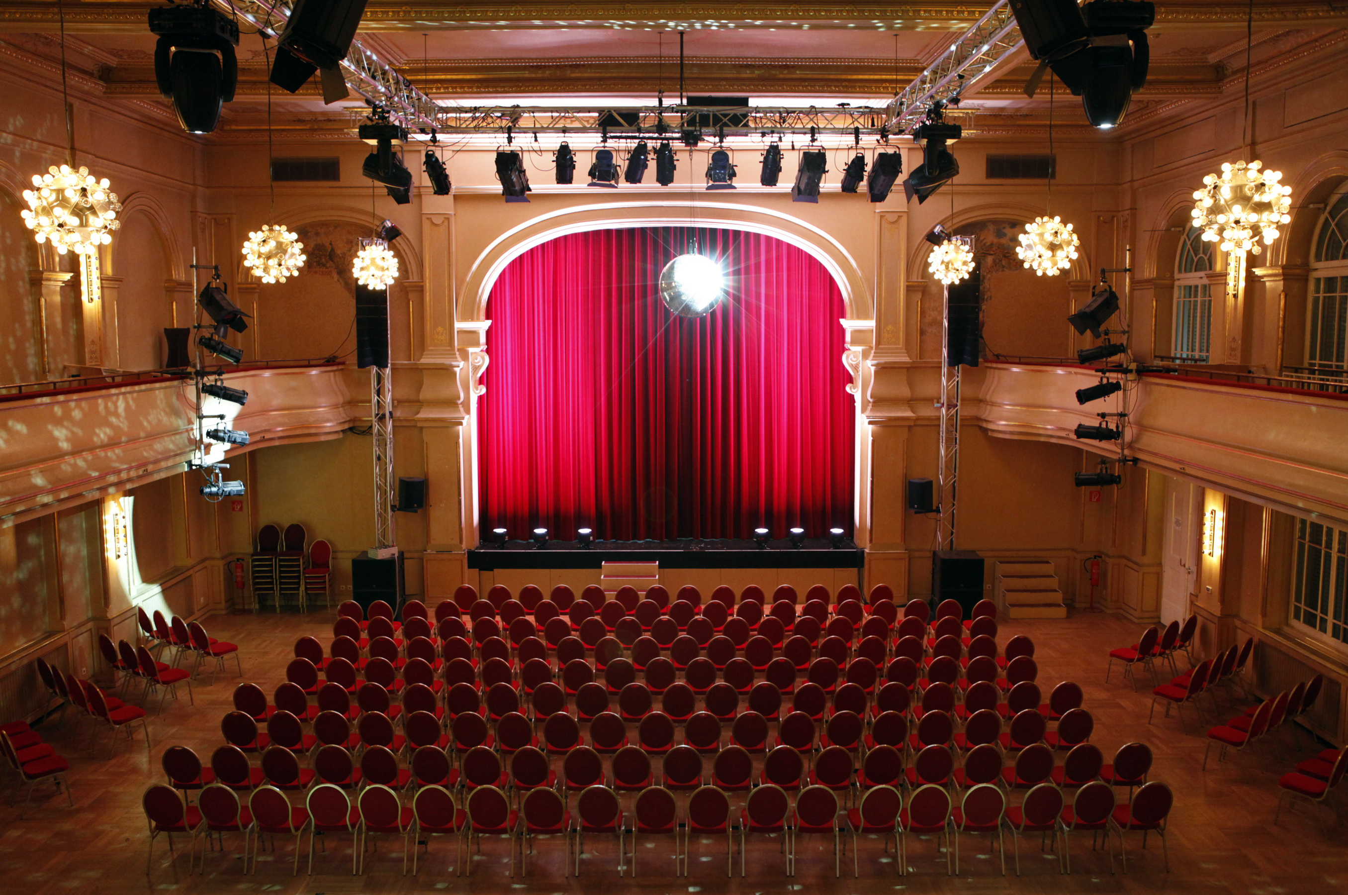 Saal Heimathafen Neukölln , Credit: Verena Eidel